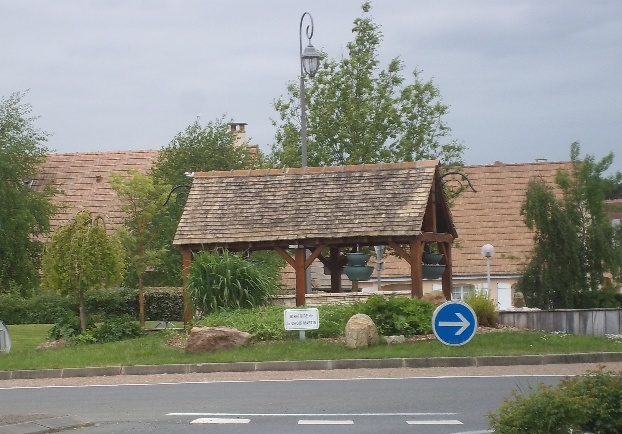 rond point sur la route du Mans